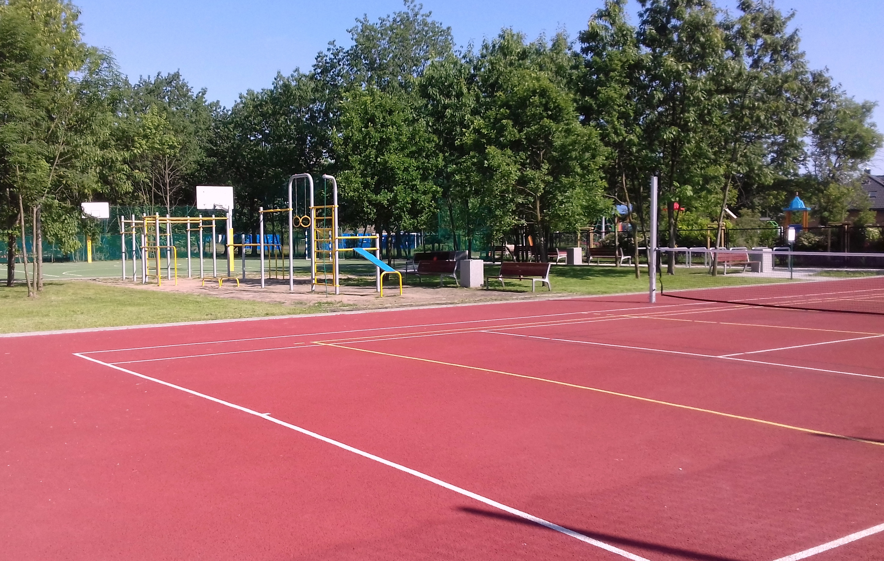 Teren sportowo-rekreacyjny przy ul. Cynamonowej na wrocławskim osiedlu Lipa Piotrowska